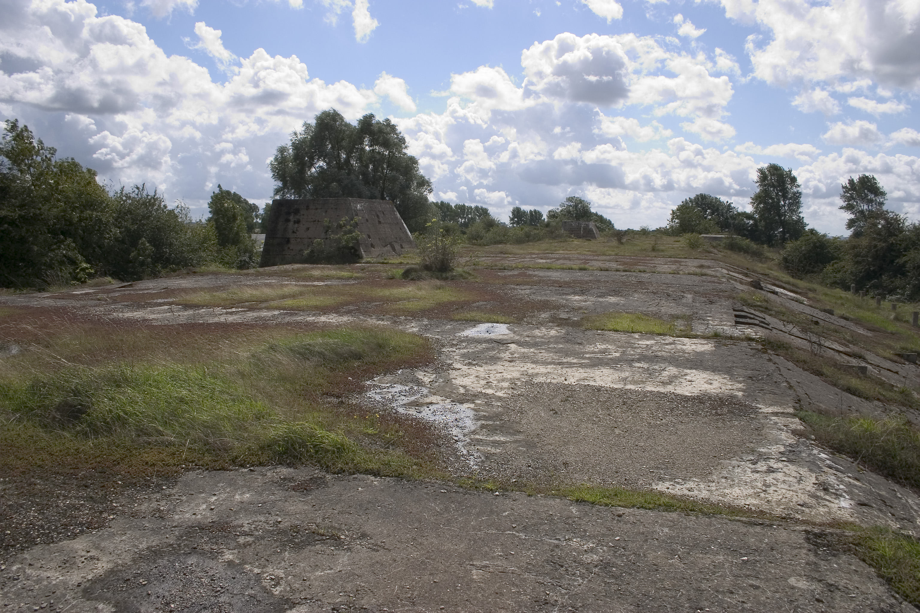 le blockhauss de Siracourt